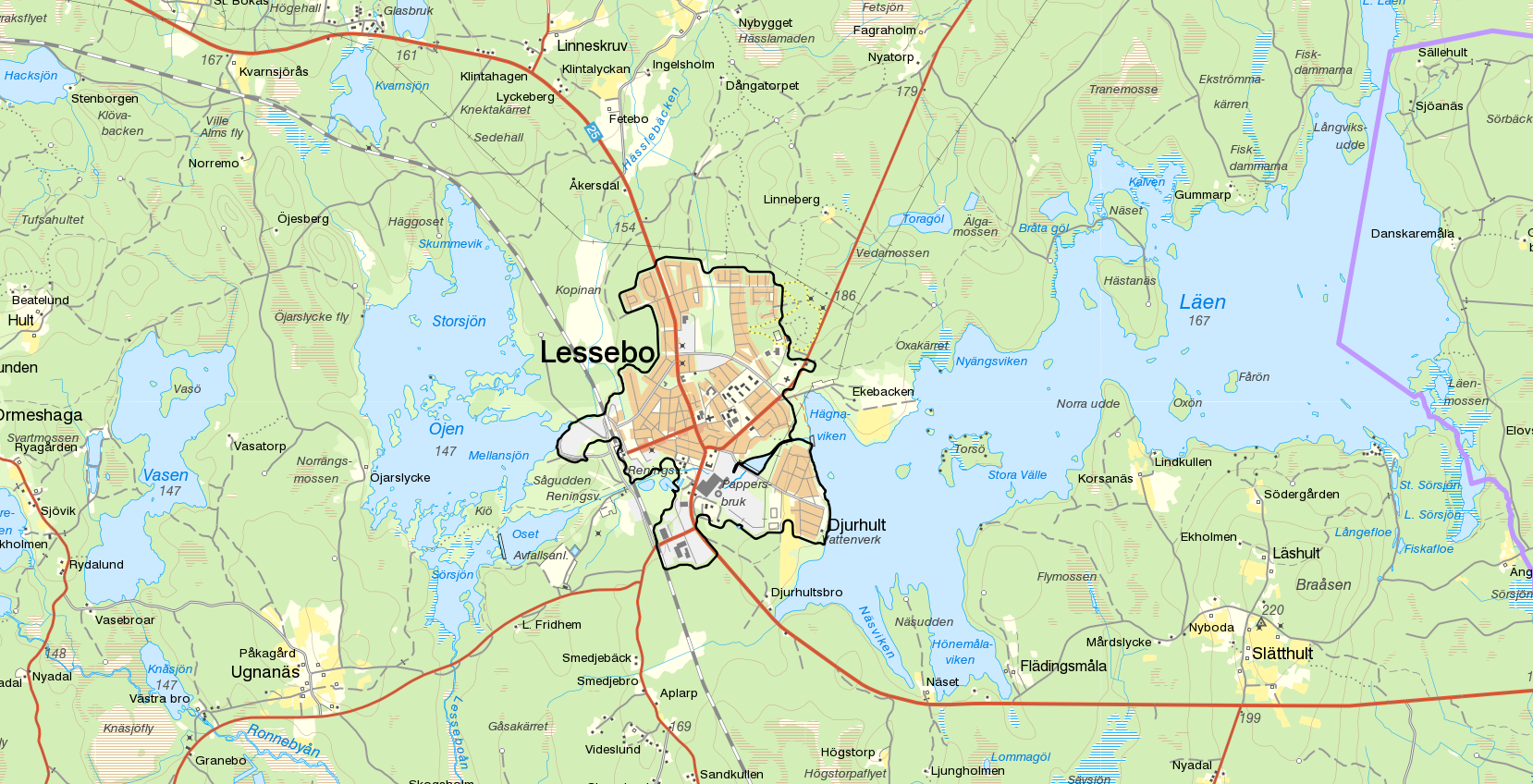 Tätorten Lessebo med gränserna från Statistiska centralbyråns tätortsavgränsning 2015 i svart. Bakgrundskarta från Lantmäteriet, skala 1:30 236.